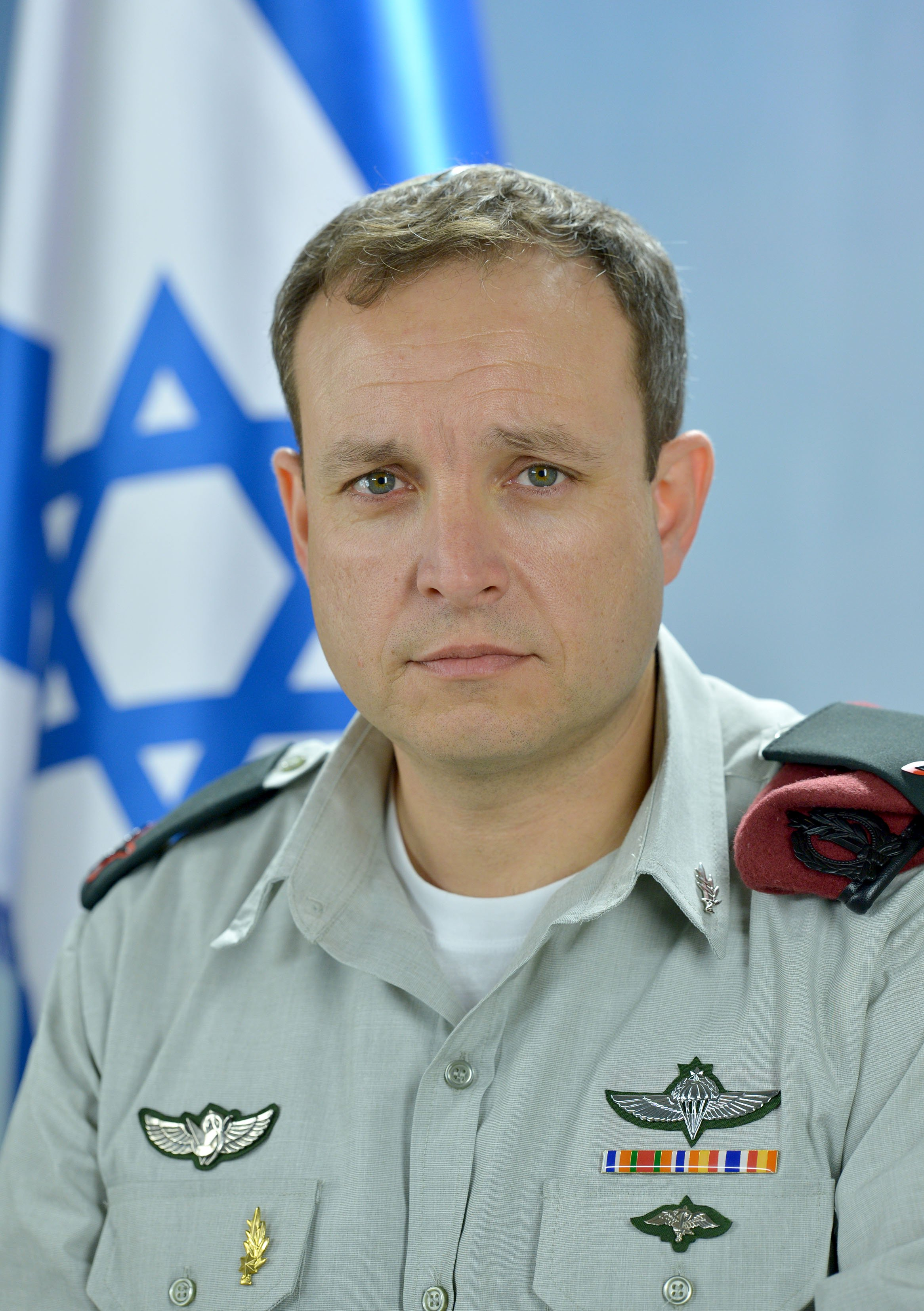 המזכיר הצבאי לראש הממשלה: תא"ל אליעזר טולדנו.